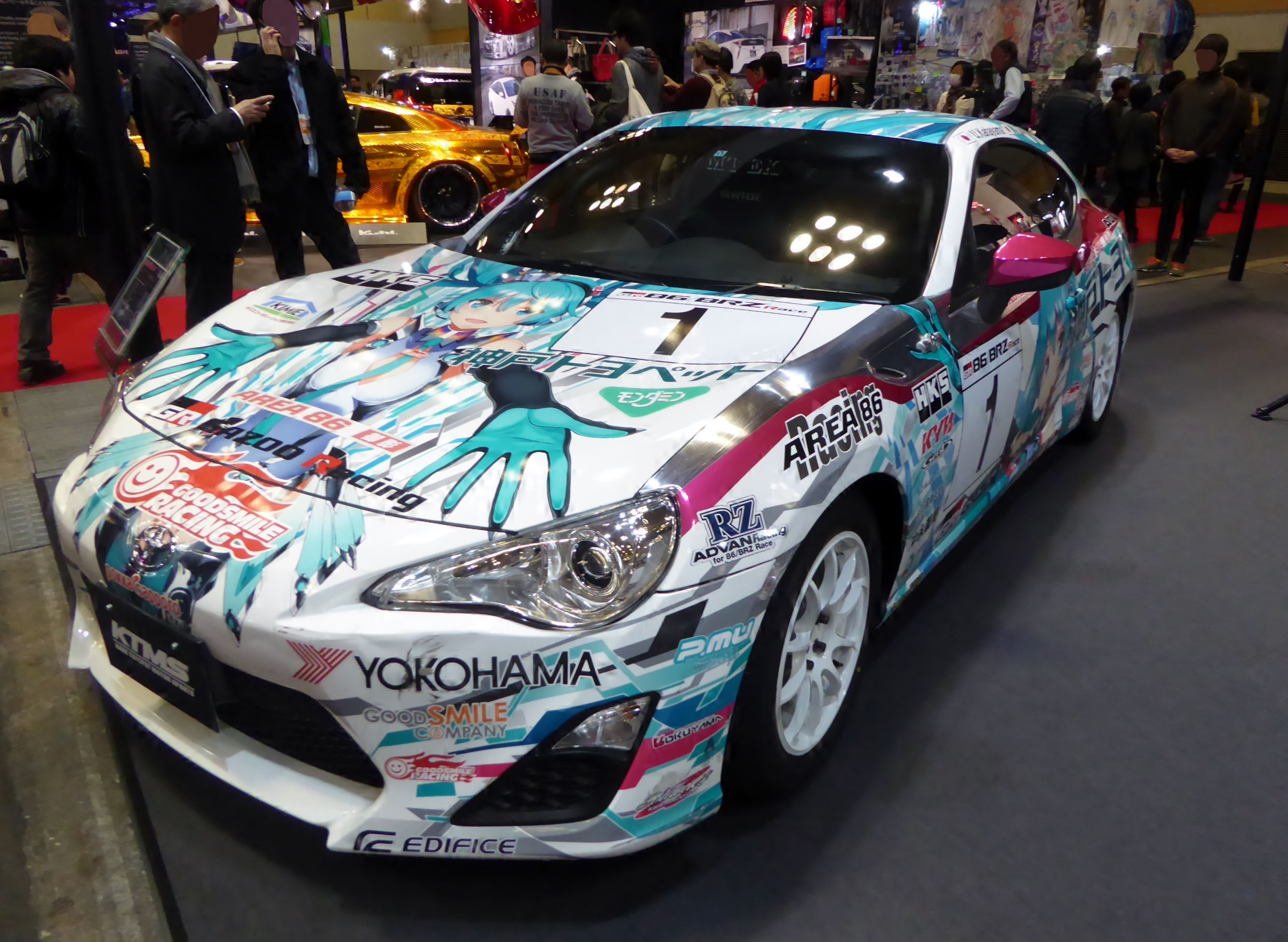 大阪オートメッセ2016において1号車GSR初音ミク神戸トヨペット86を撮影。